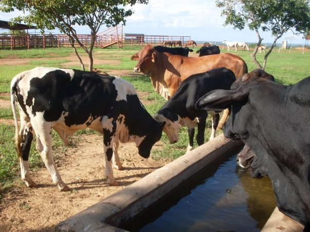 Ganado vacuno en Hato Santa Rosa - Santa Rosa de Capanaparo estado Apure - Venezuela